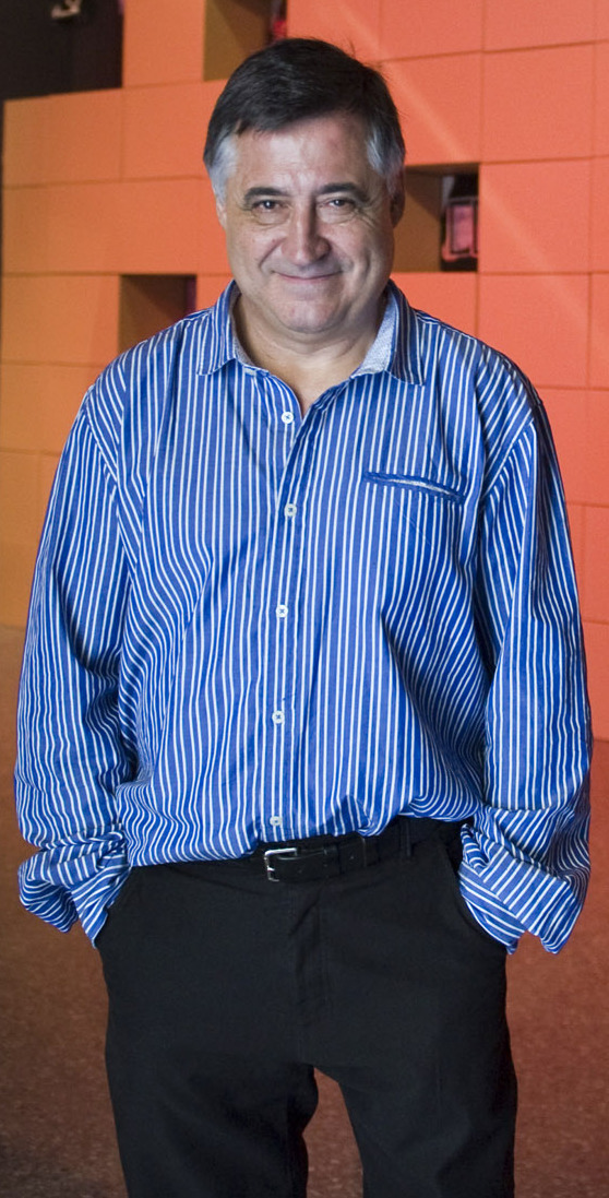 Gervasio Sánchez al Museu Valencià d'Etnologia. Fotos de Raquel Abulaila.